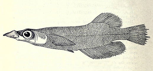 Entenschnabelkärpfling (Adrianichthys kruyti) Darstellung aus: 'Max Weber; L. F. de Beaufort: The fishes of the Indo-Australian Archipelago 4. Leiden, E. J. Brill ltd. 1922'